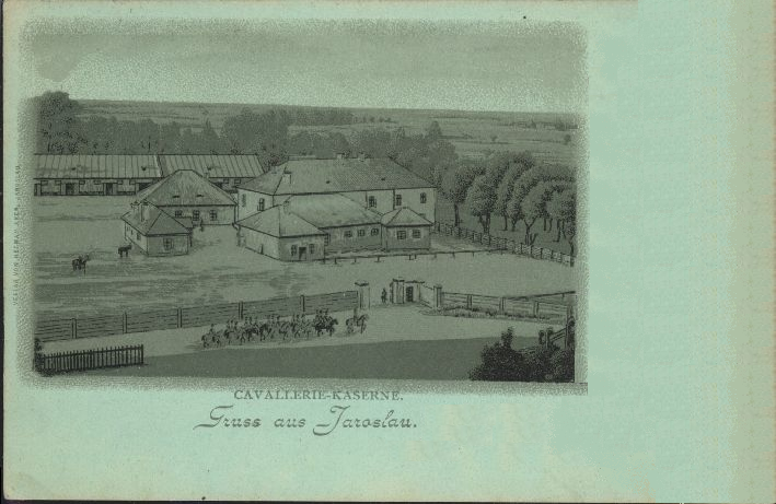 Kavallerie Kaserne in Jaroslau um 1910